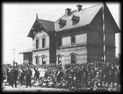 ehemaliger Bahnhof (am Eröffnungstag) an der Bahnstrecke Osthofen–Gau-Odernheim in Dittelsheim-Heßloch